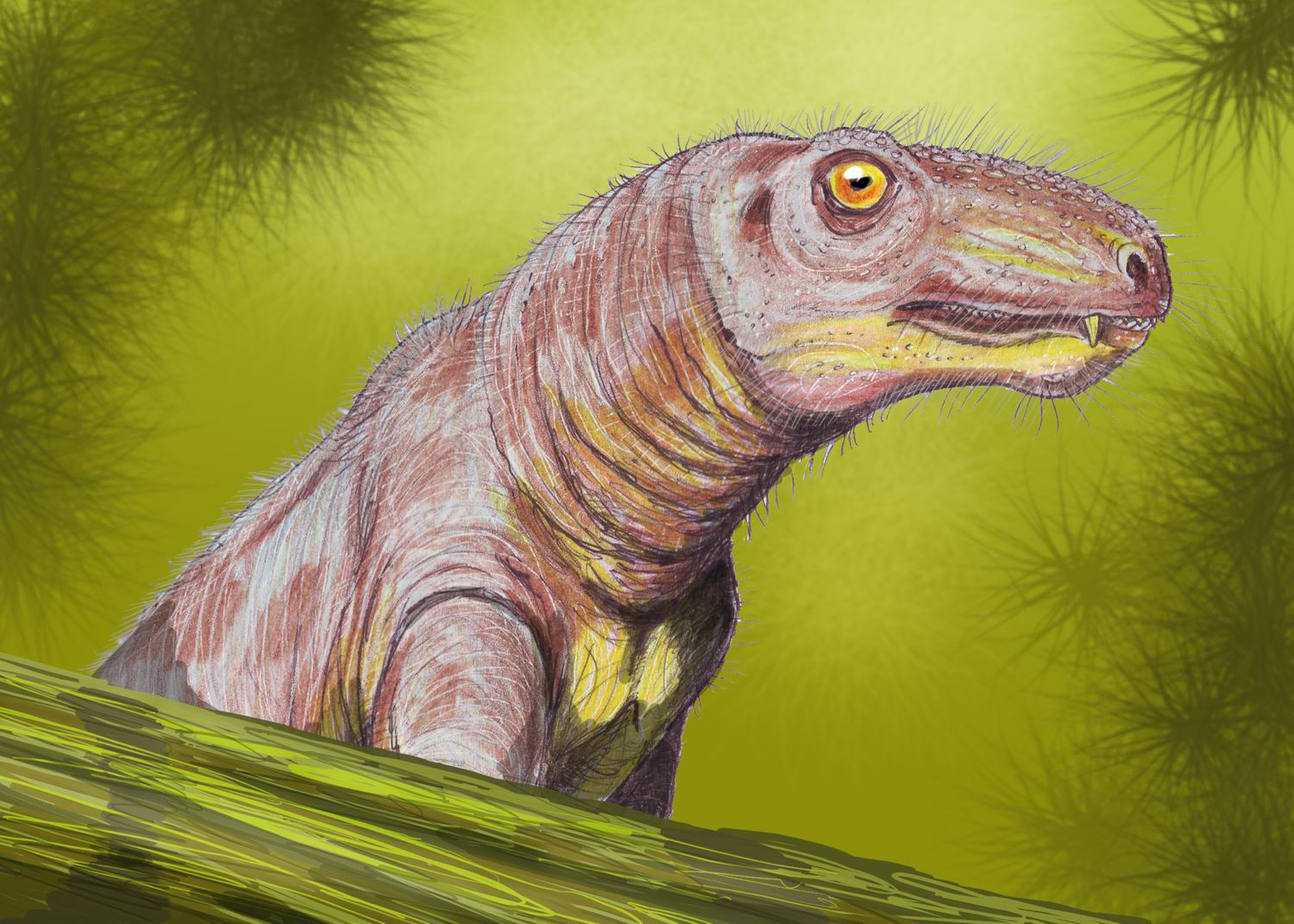 Microurania minima